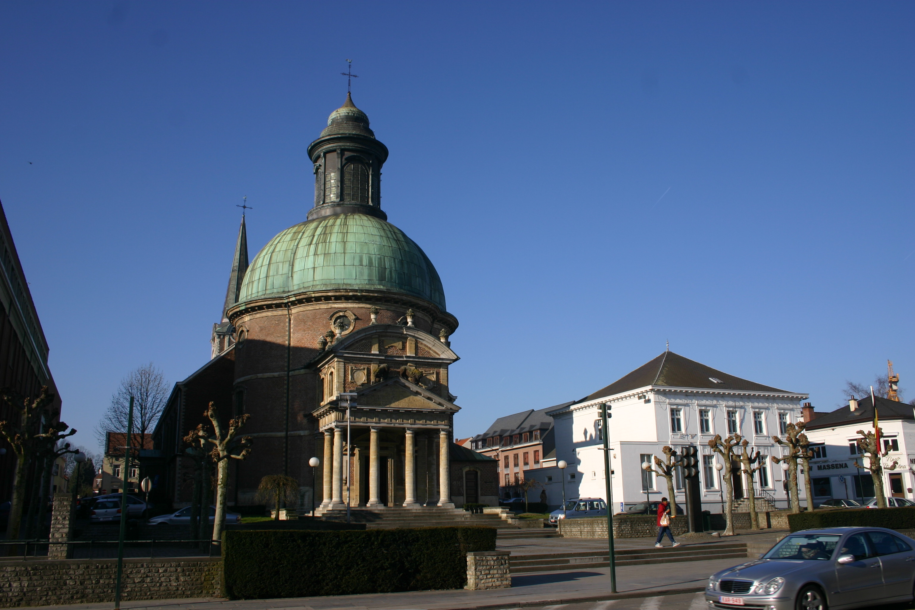 Eglise St Joseph Waterloo Belgique